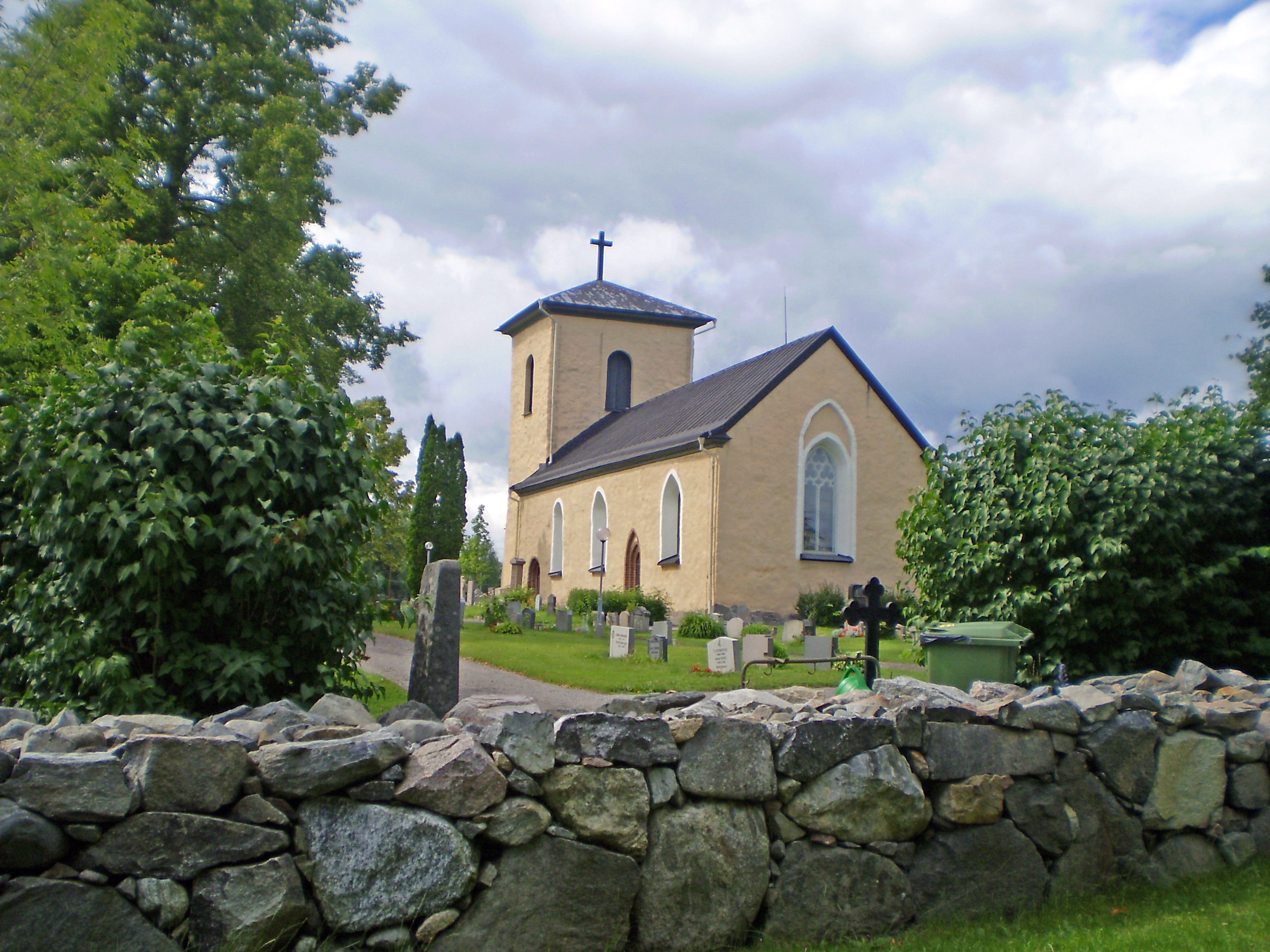 Kalmar kyrka, Bålsta, Håbo kommun